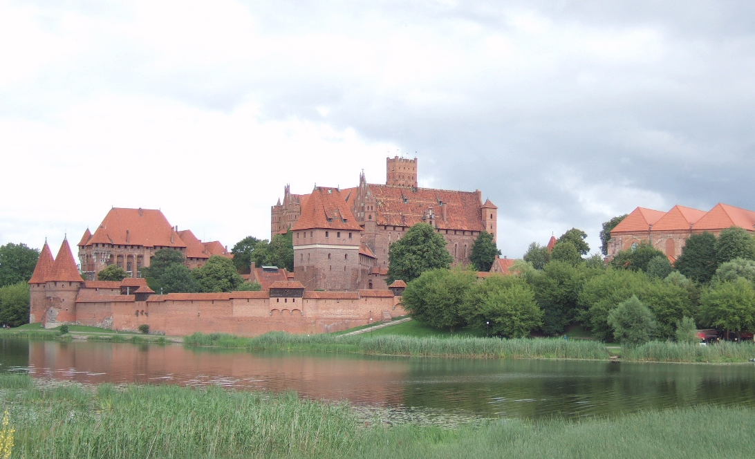 Zamek w Malborku - widok z zachodniego brzegu Nogatu.